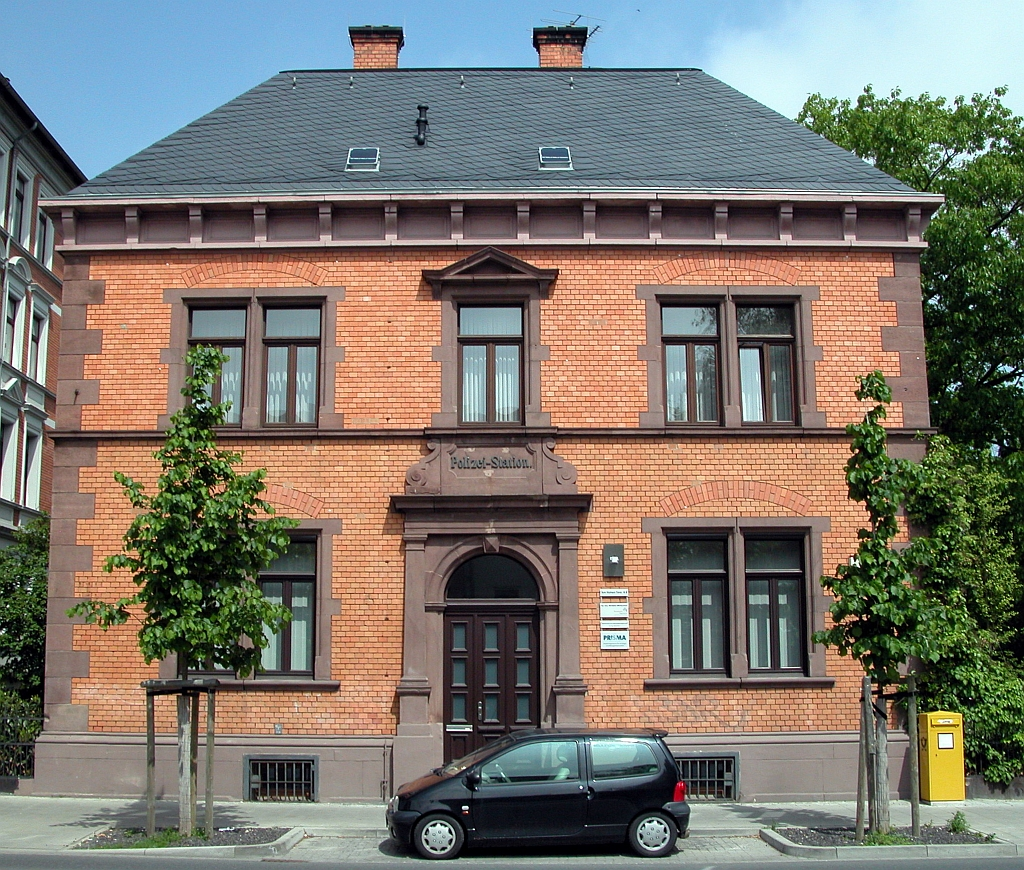 Braunschweig: Polizeistation Madamenweg von Süden gesehen. Erbaut 1900.